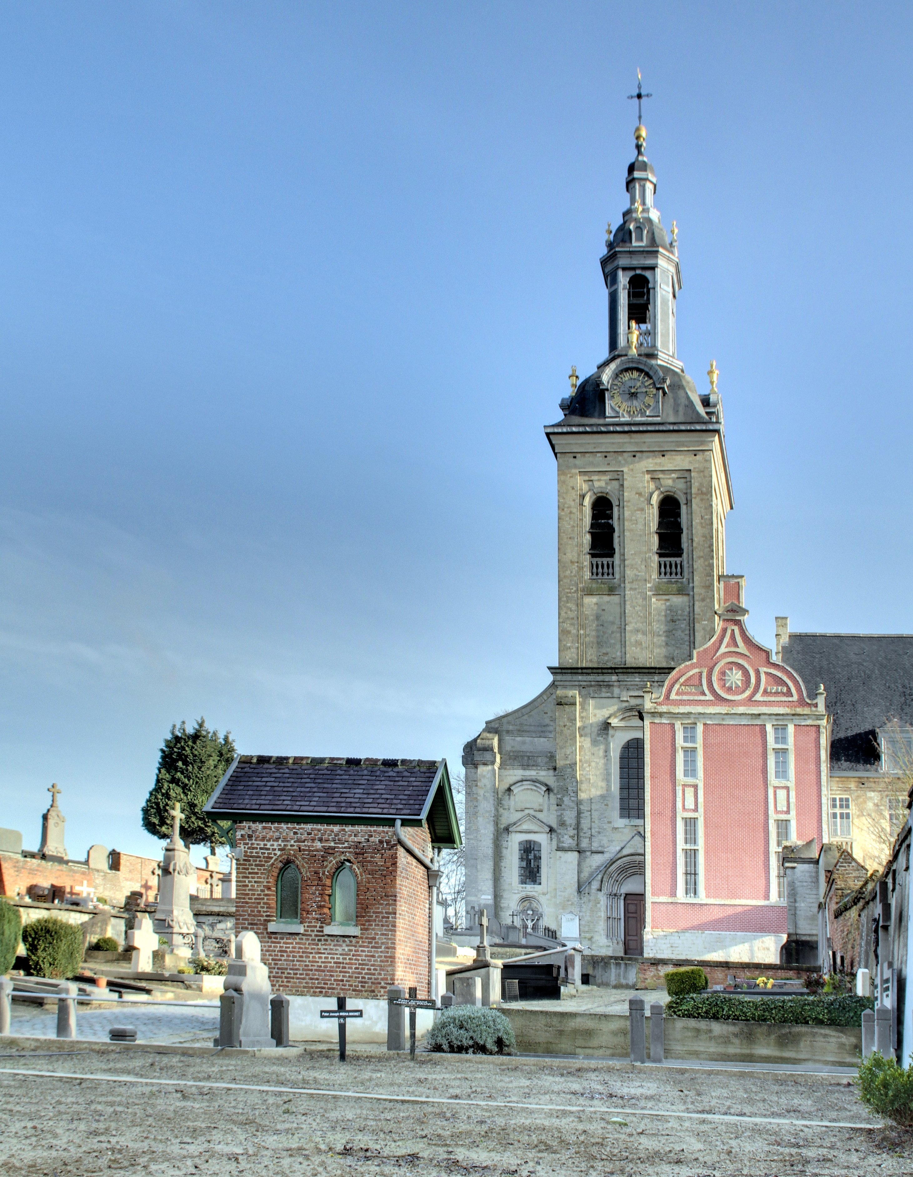 Abdij van Park